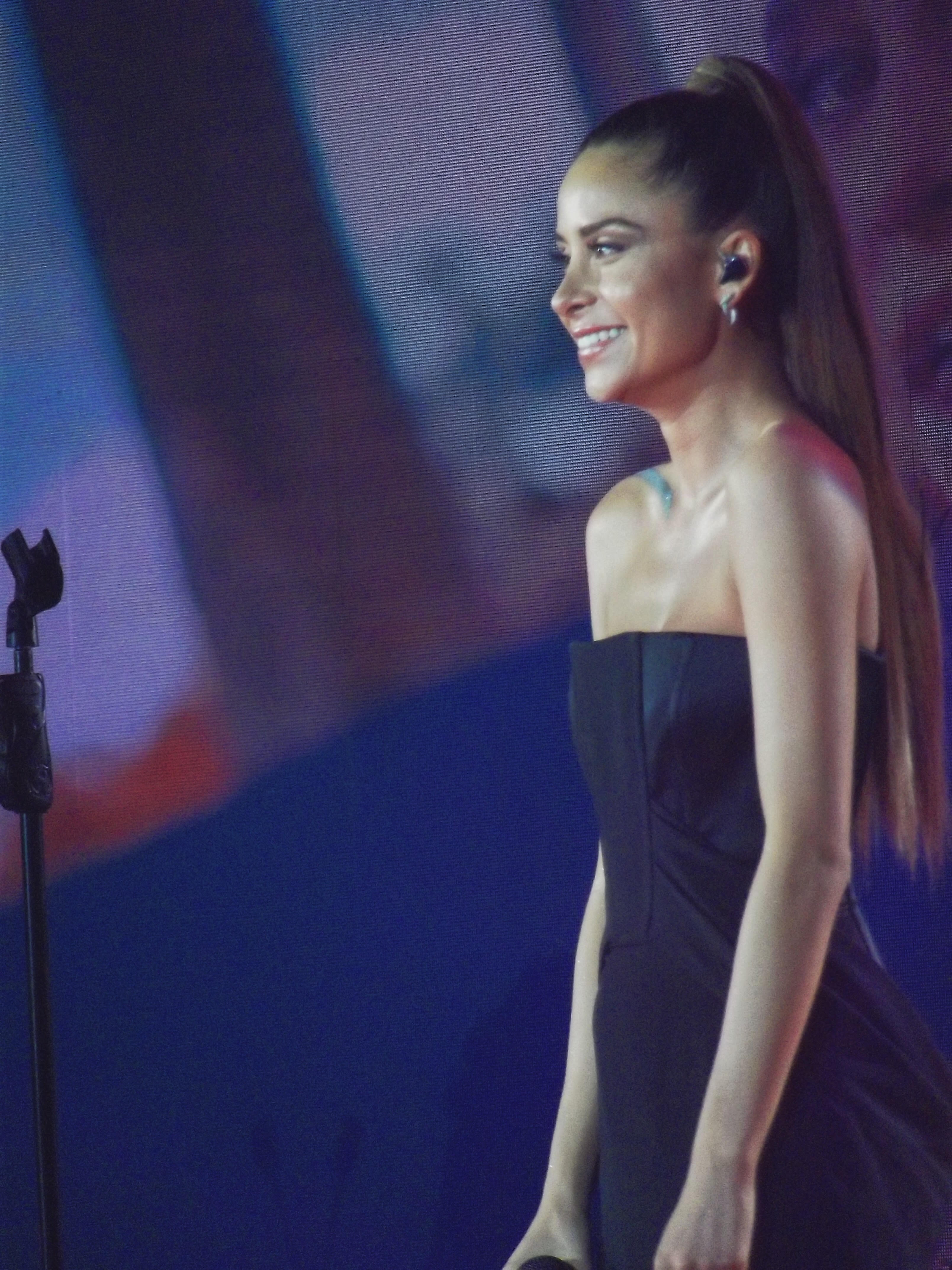 Cami en los Premios Pulsar 2019